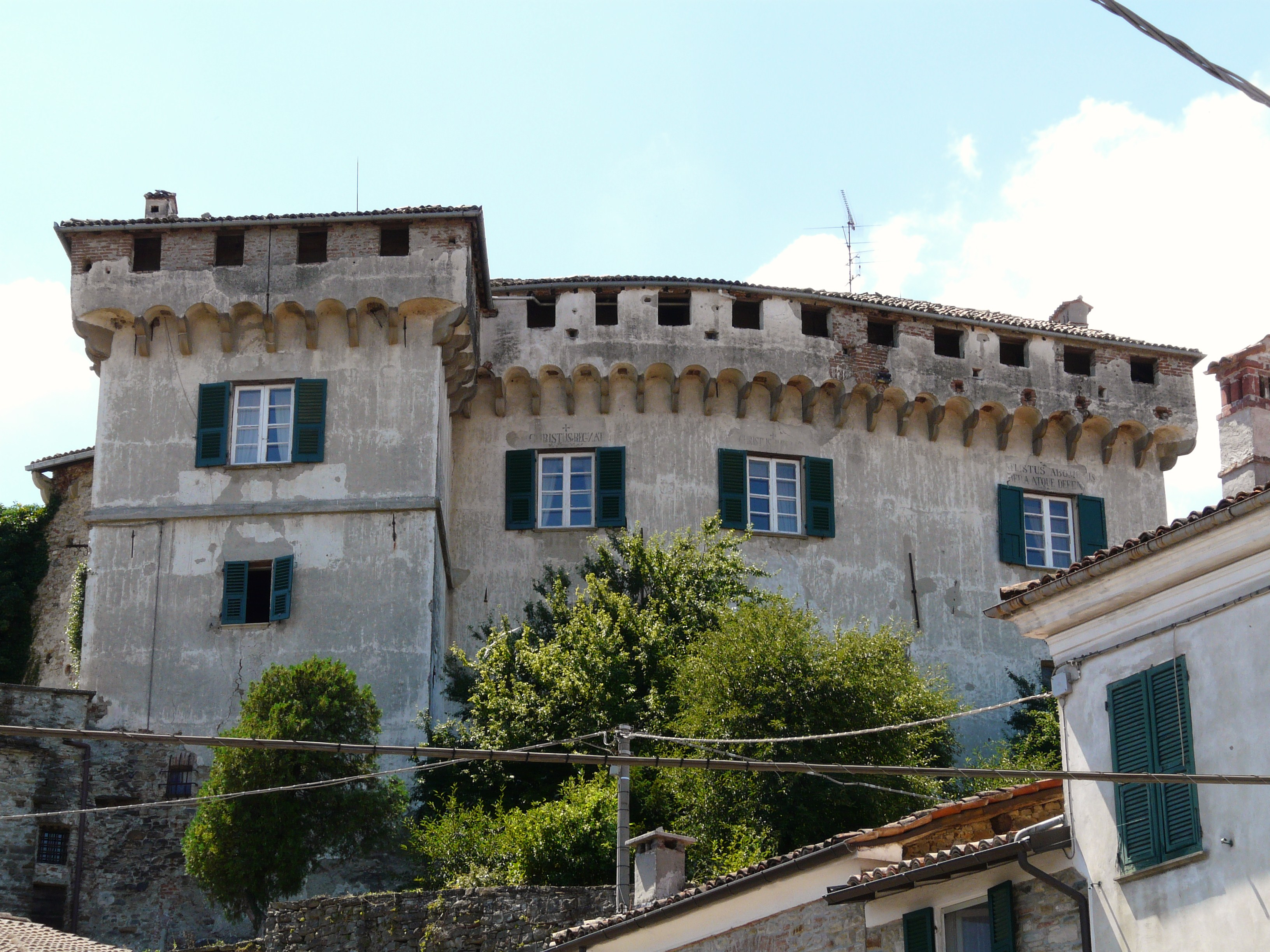 Castello Doria di Mornese, Piemonte, Italia